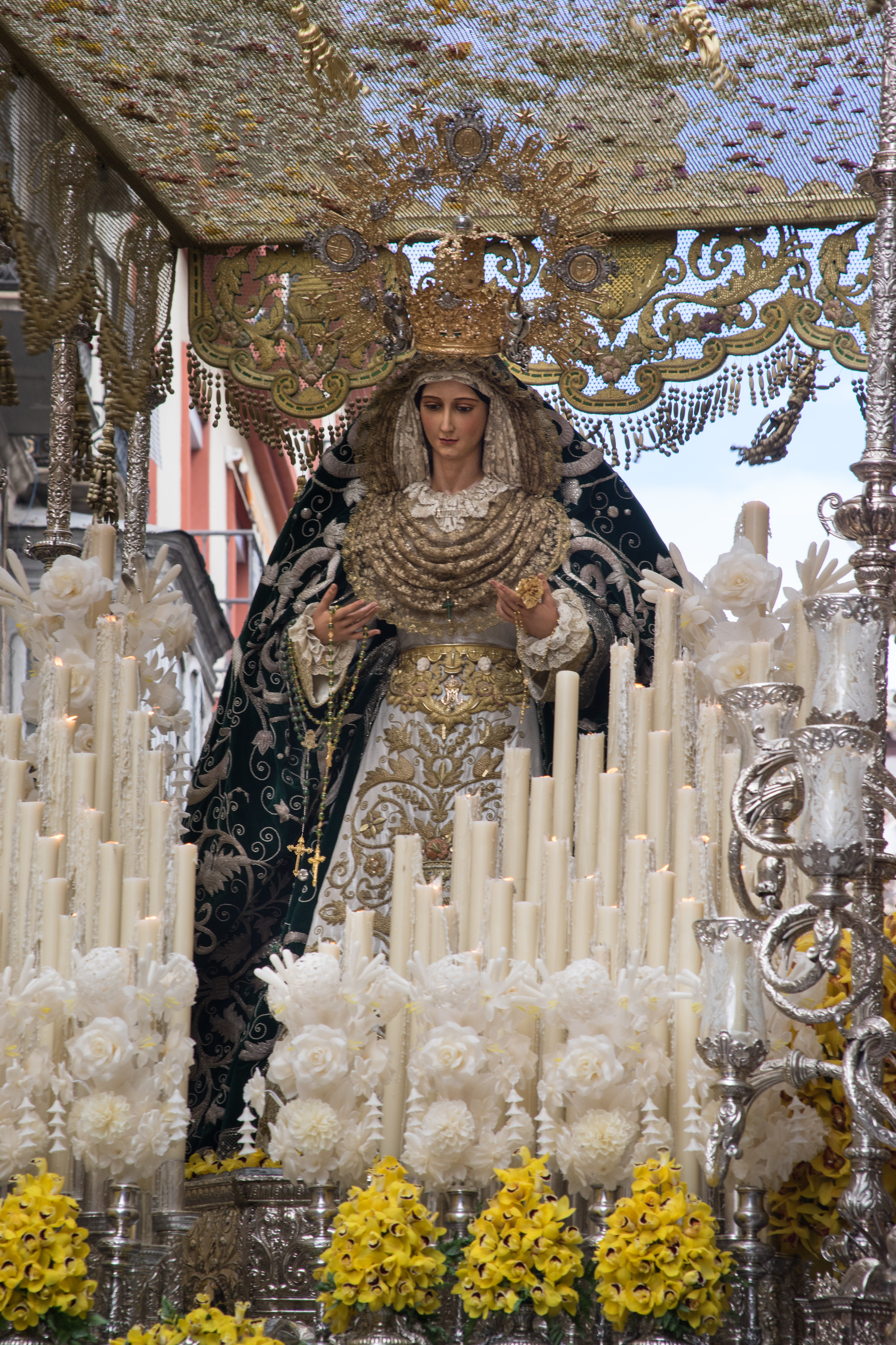 Trono del Amparo de la Real Cofradía de Nuestro Padre Jesús a su Entrada en Jerusalén y María Santísima del Amparo This is a photography of a Folklore festival in Spain (Wikidata id Q9075883).